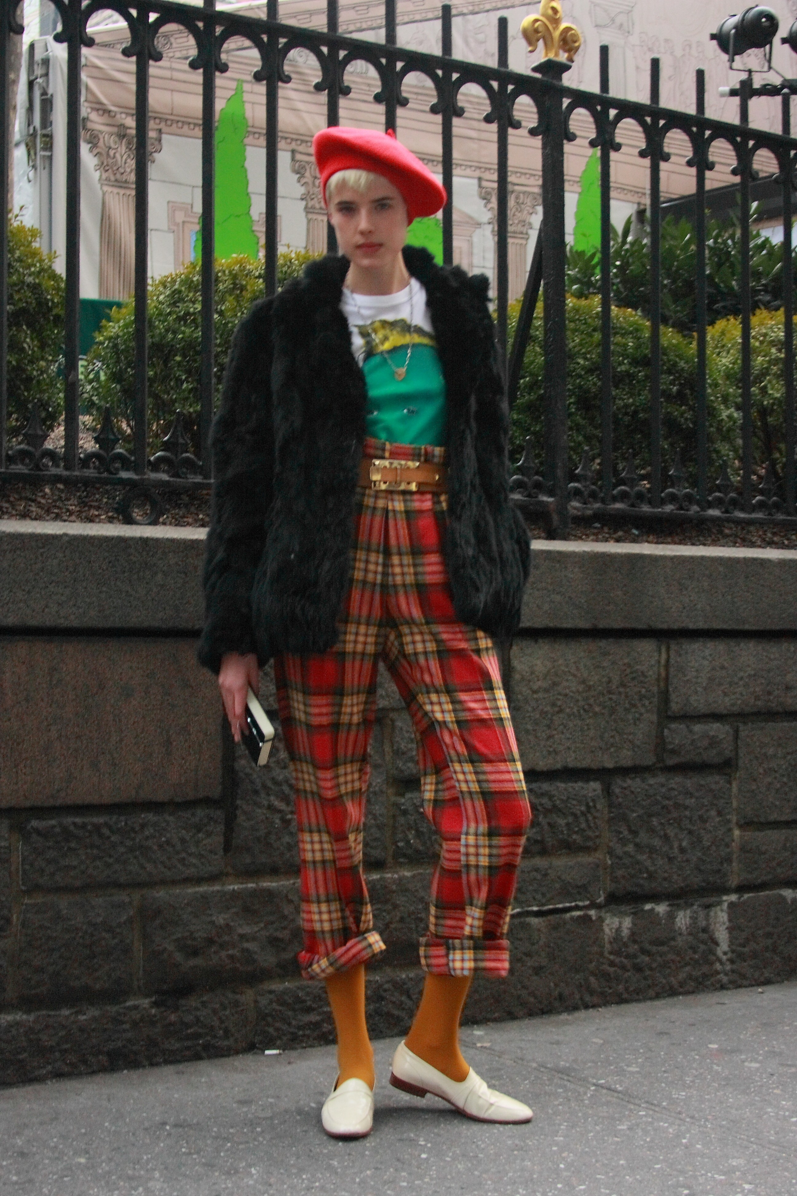 Model Agyness Deyn